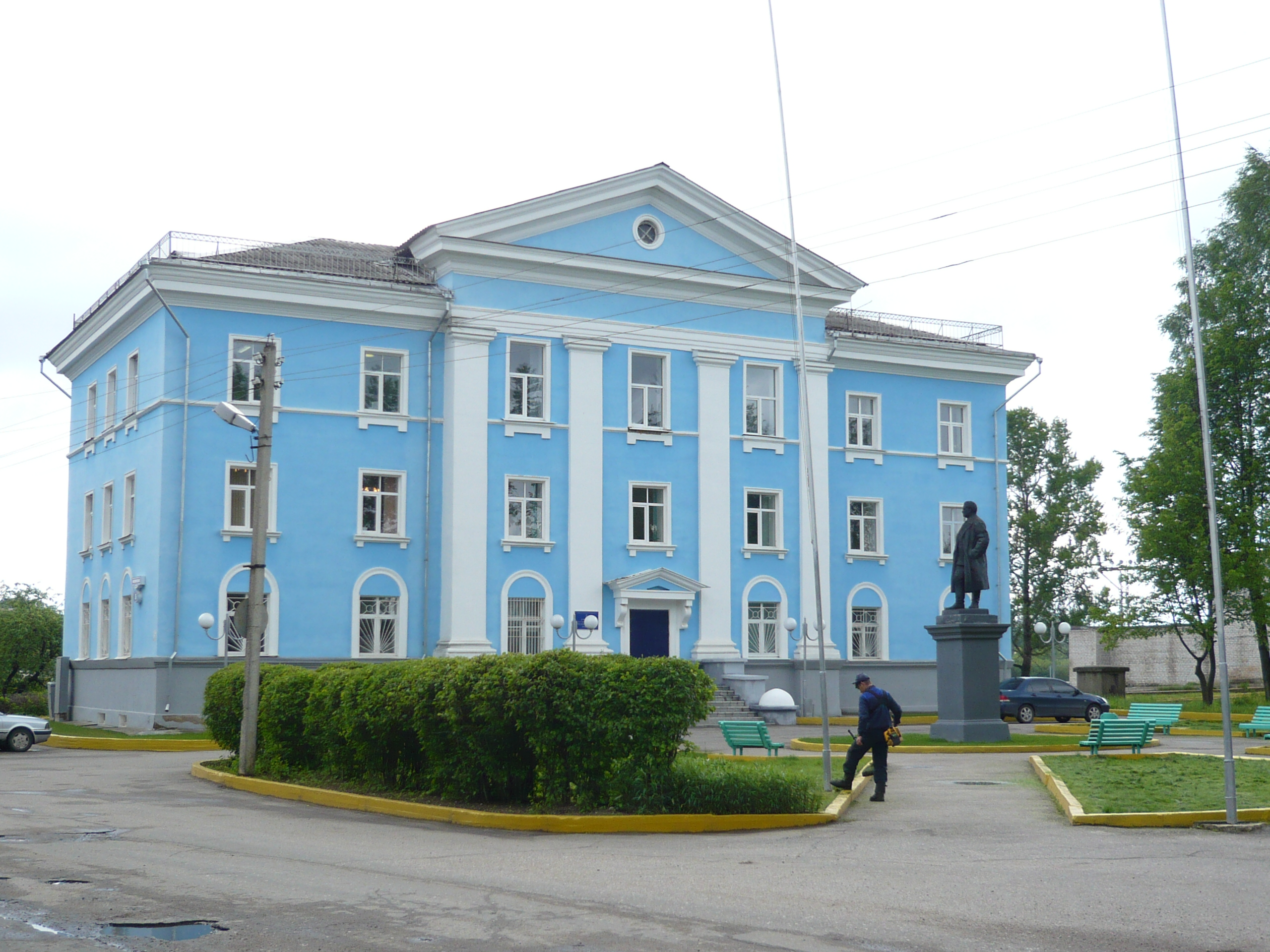 Здание дирекции каменской бумажно-картонной фабрики